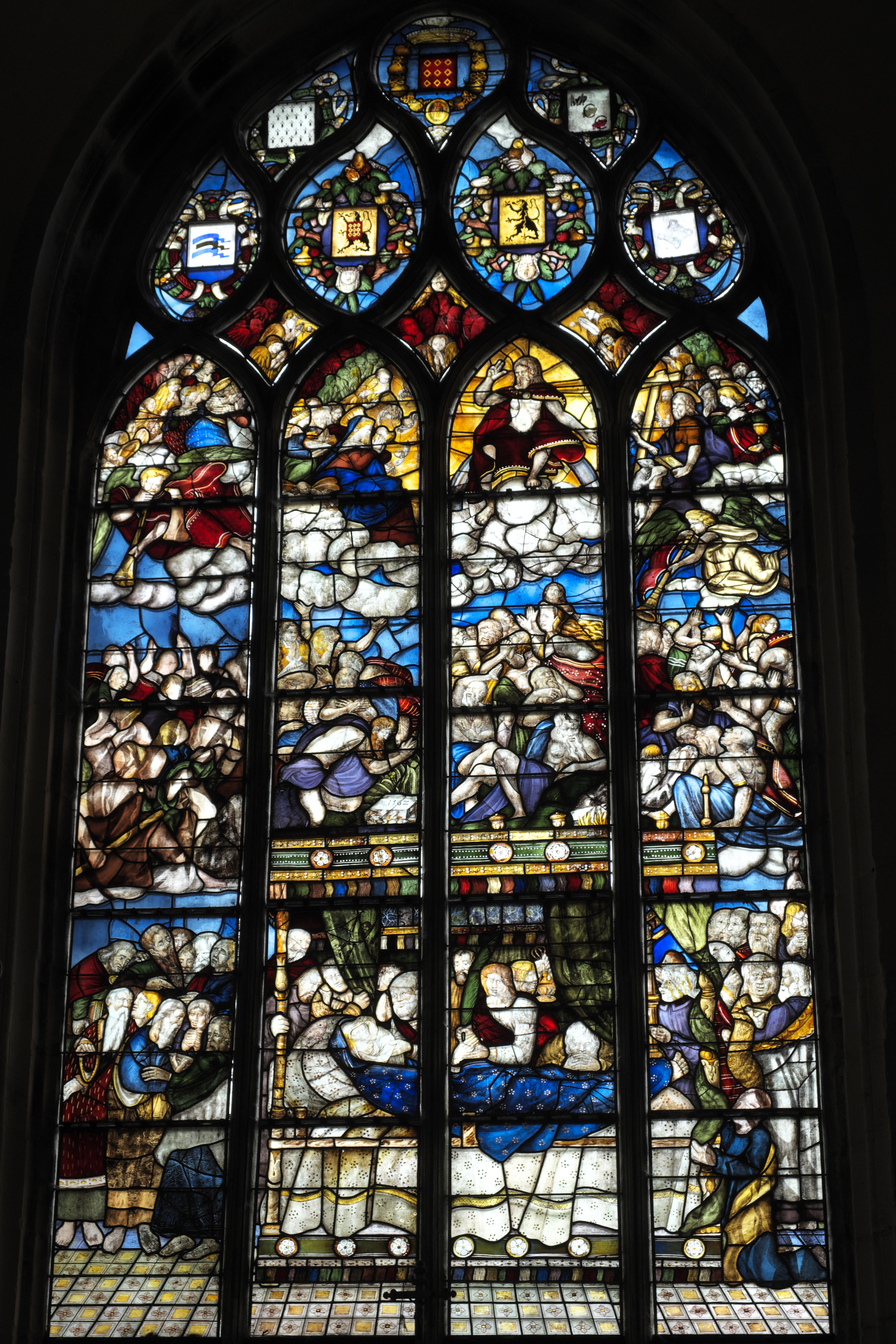 Katholische Pfarrkirche Saint-Salomon in La Martyre im Département Finistère (Region Bretagne/Frankreich), Bleiglasfenster (baie 3) aus dem 16. Jahrhundert; Darstellung: Marientod